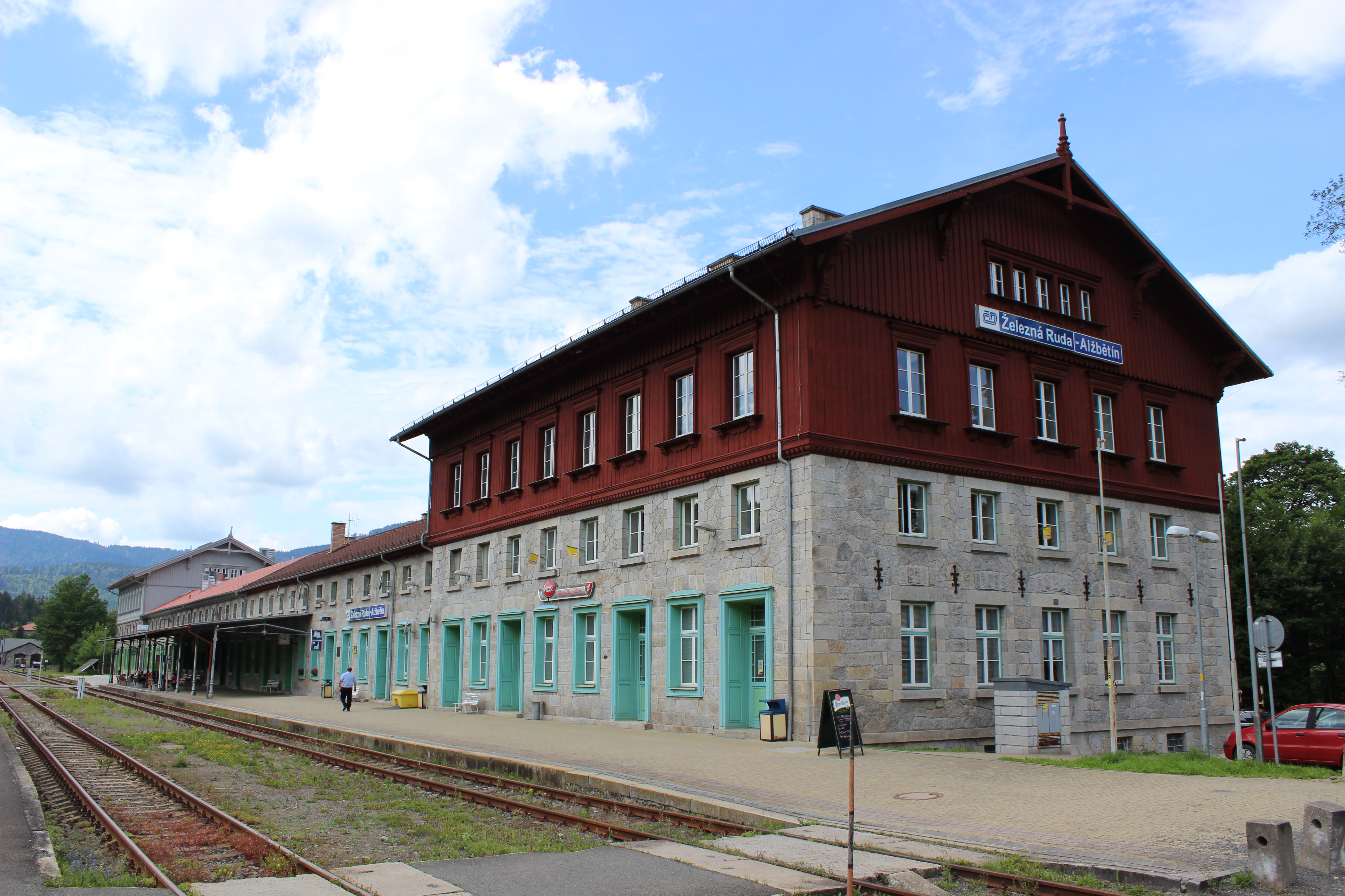 Staniční budova v Alžbětíně.